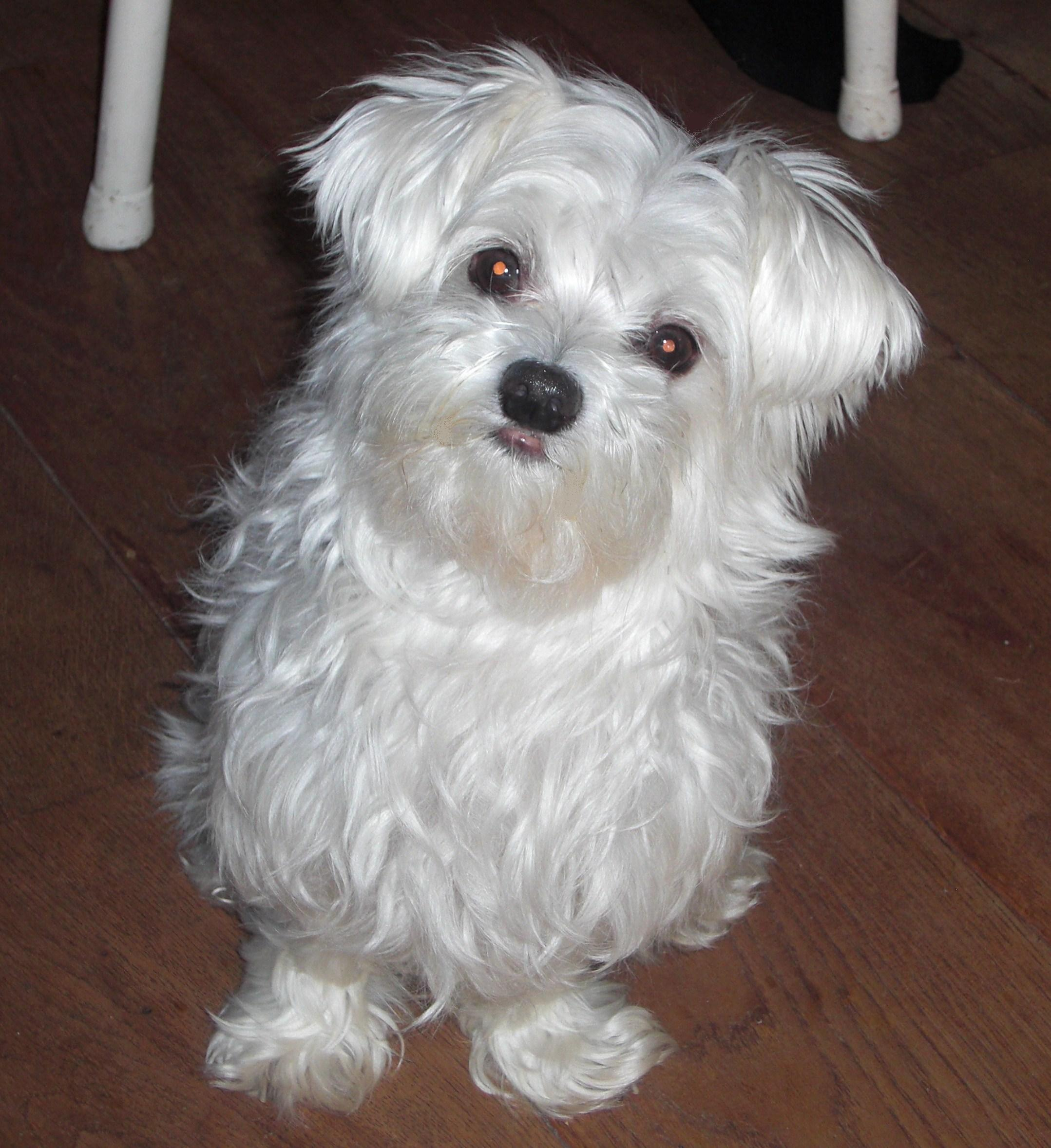 Maltezer